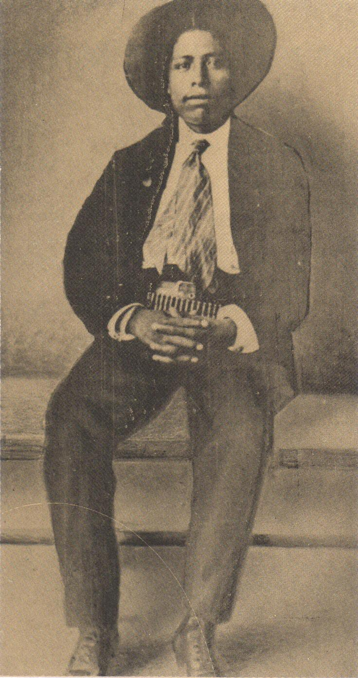 General Pedro Casas Medina